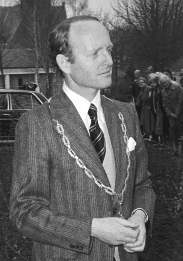 Prins Claus en de burgemeester van Haastrecht